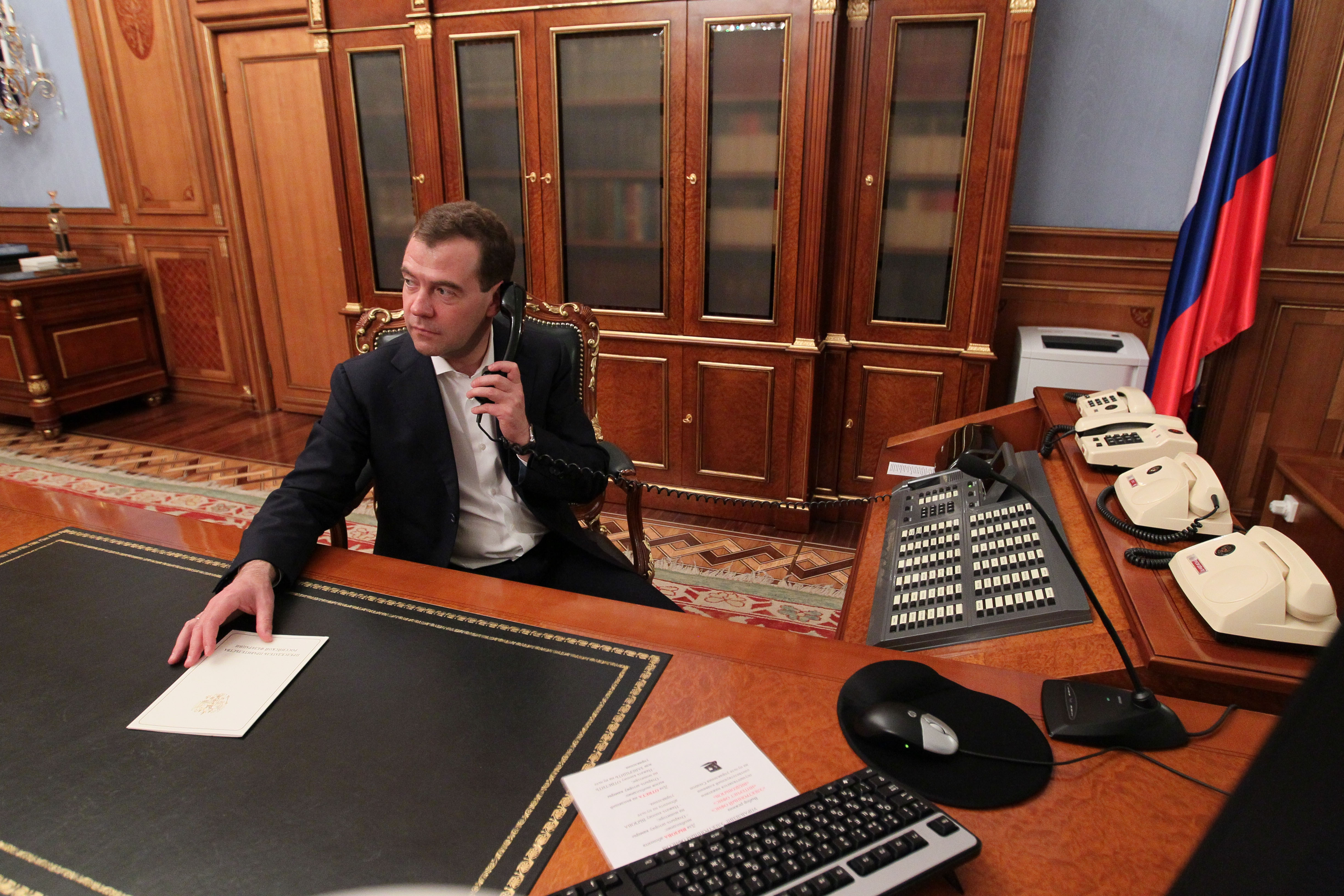 Председатель Правительства Российской Федерации Д.А.Медведев прибыл в Дом Правительства, где провёл телефонные разговоры с Президентом Казахстана Н.А.Нарзабаевым, а также Премьер-министром Казахстана К.К.Масовым